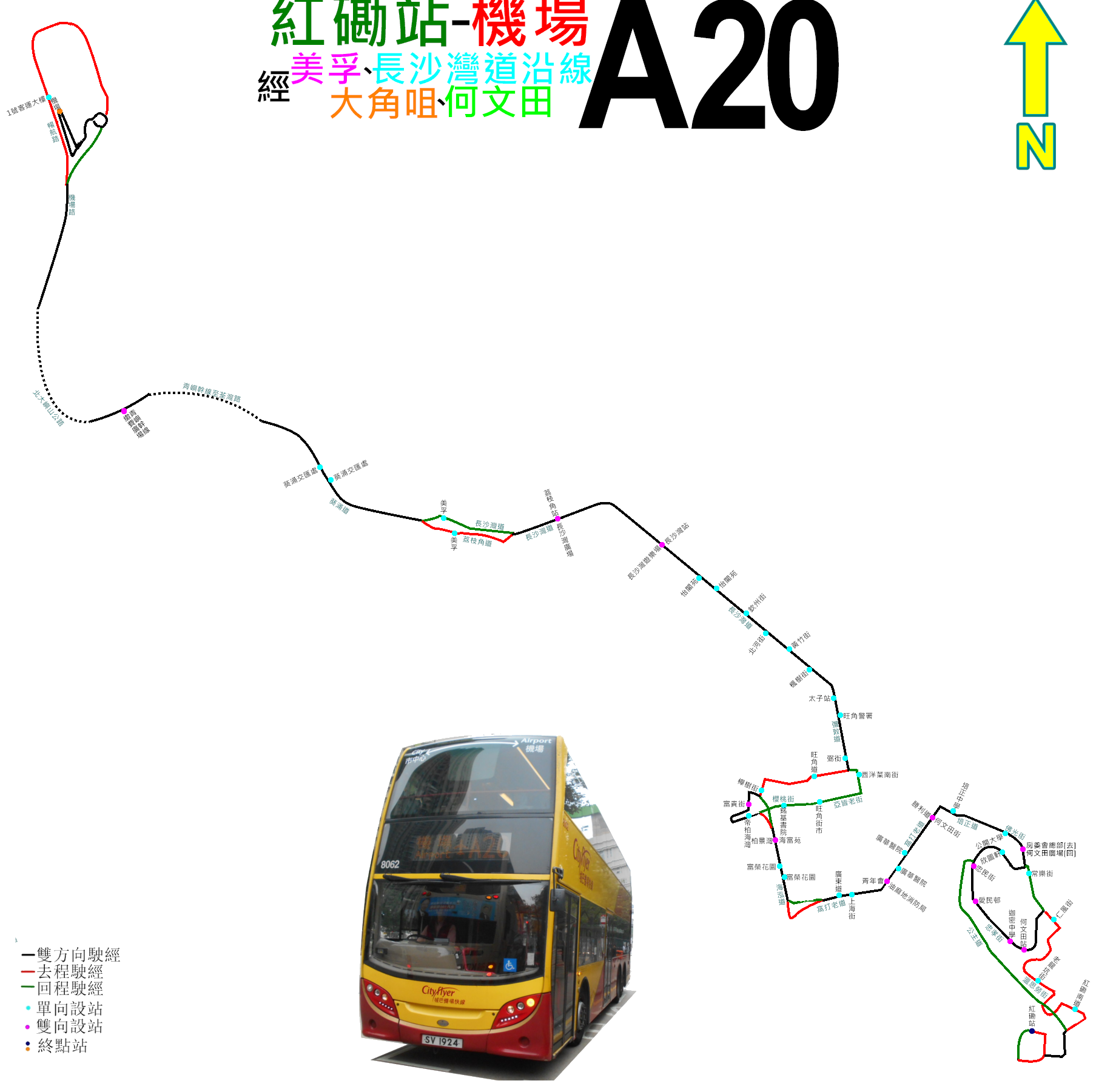 中文（香港）: 城巴A20線的走線圖